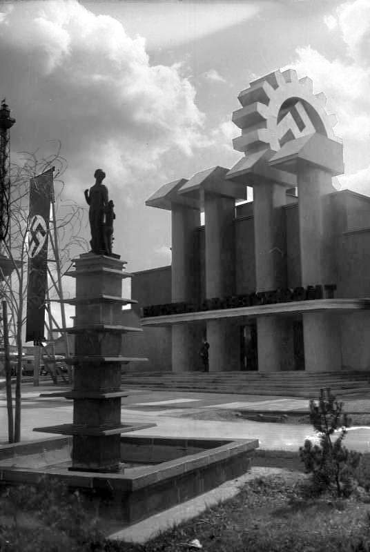 Die Eröffnung der großen Schau "Deutsches Volk-Deutsche Arbeit" am Kaiserdamm in Berlin! Der Grandiose Bau am Haupteingang der Schau der Deutschen Arbeitsfront mit den riesigen Symbolen.